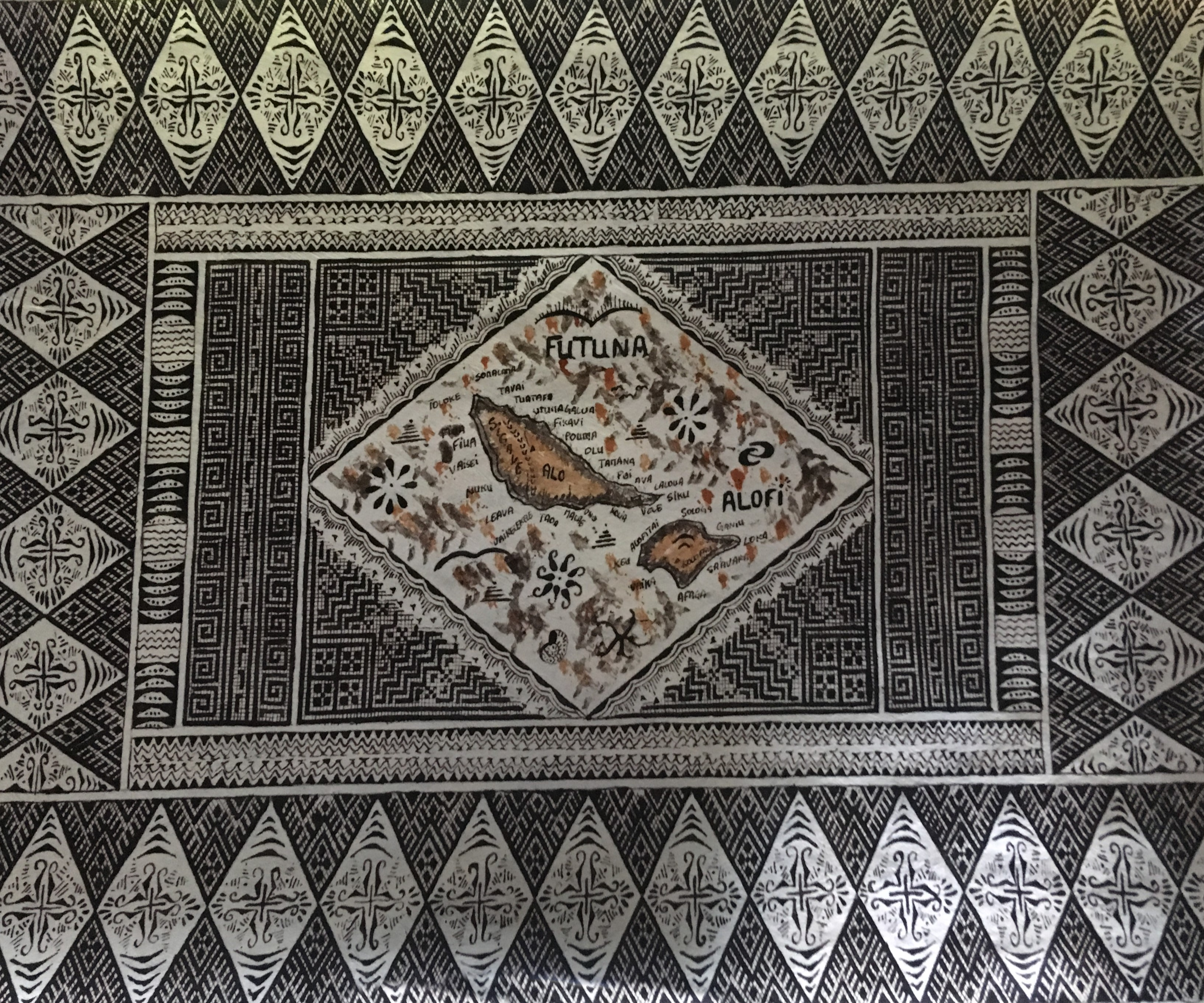 Les femmes de Futuna fabriquent de réelles œuvres d'art dont elles ont le secret de fabrication, dont la fabrication de l'encre.